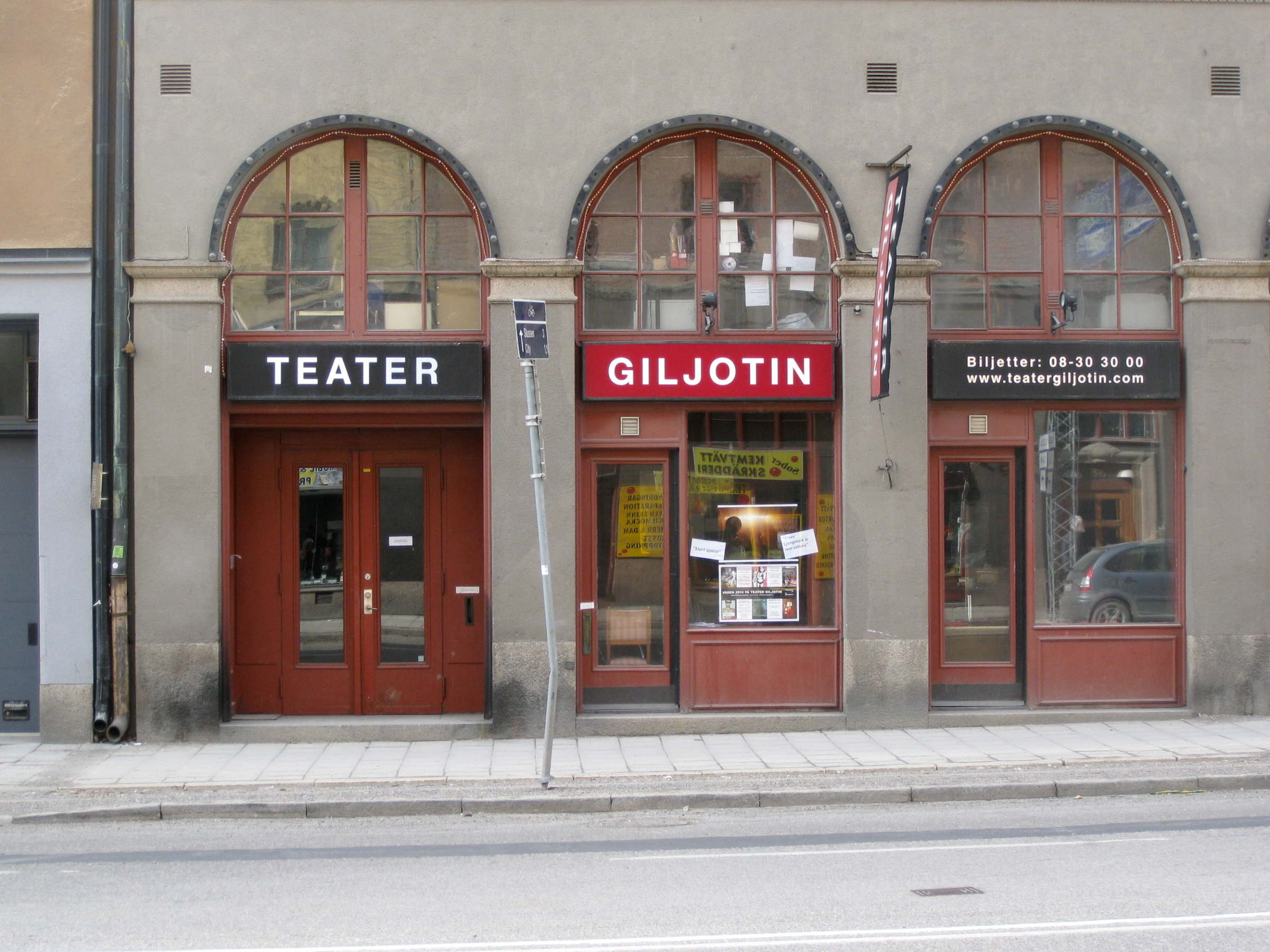 Teater Giljotin vid Sankt Eriksplan, Stockholm